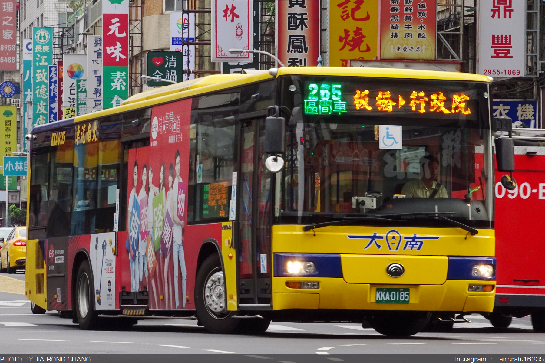 YUTONG - ZK6128GH - KKA-0185